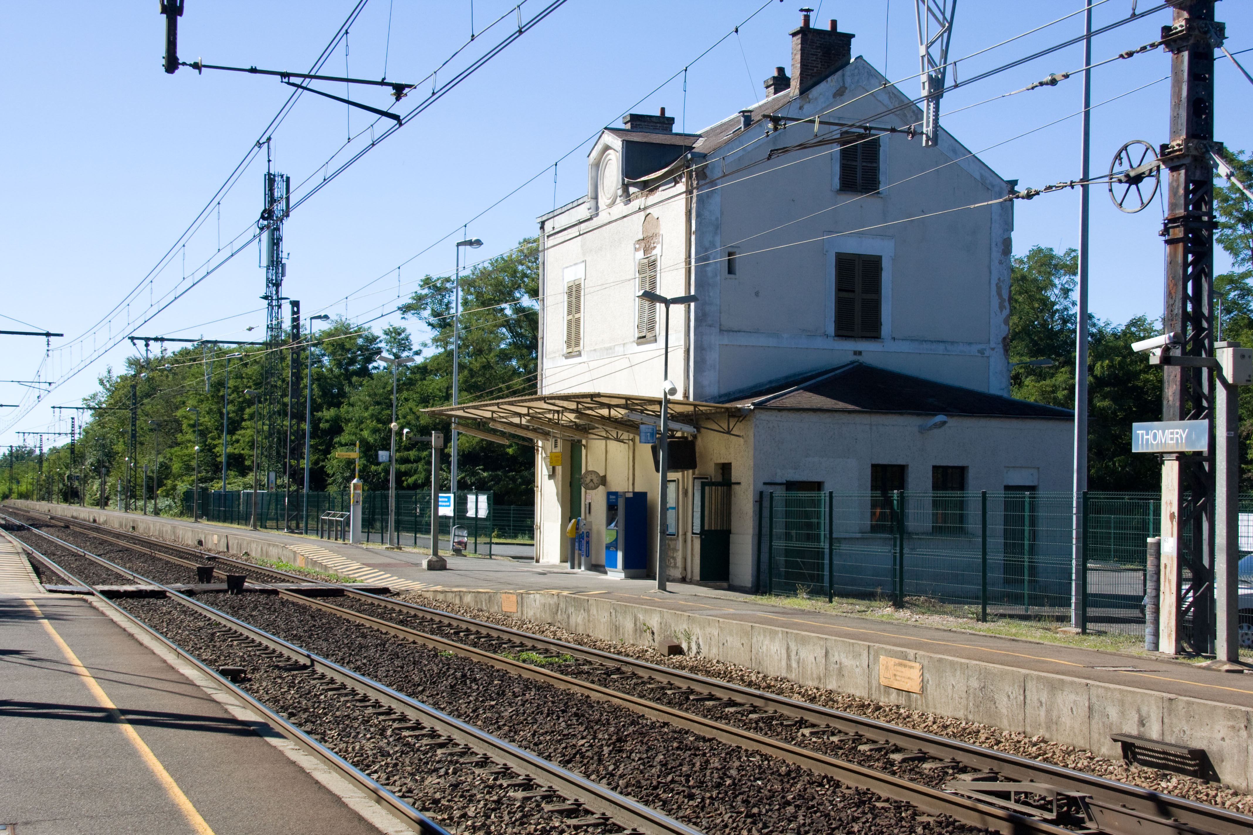 Gare de Thomery, Fontainebleau, Seine-et-Marne, France